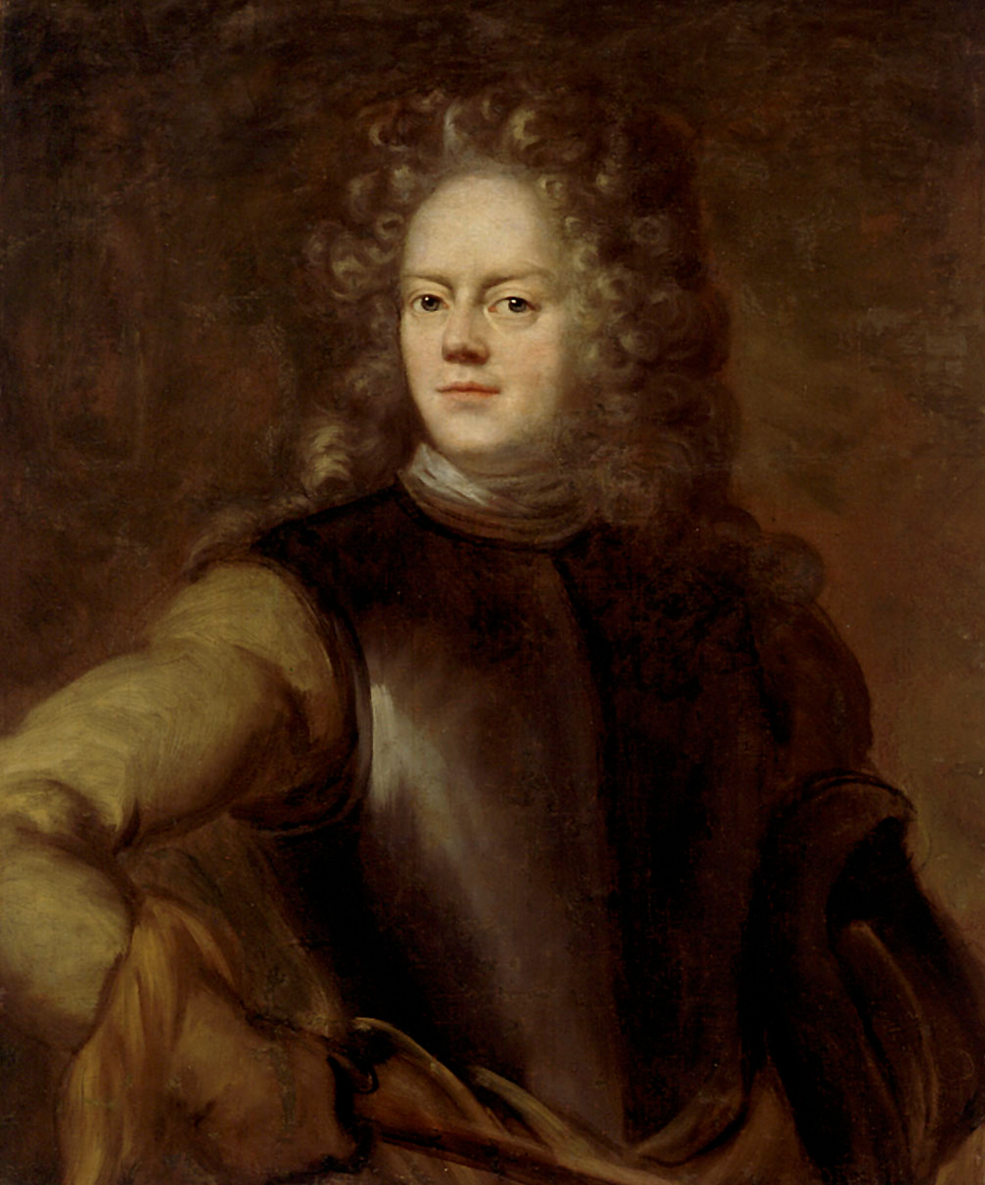 Jacob Johann Hastfer (1647–1695), Rootsi riigitegelane ja sõjaväelane